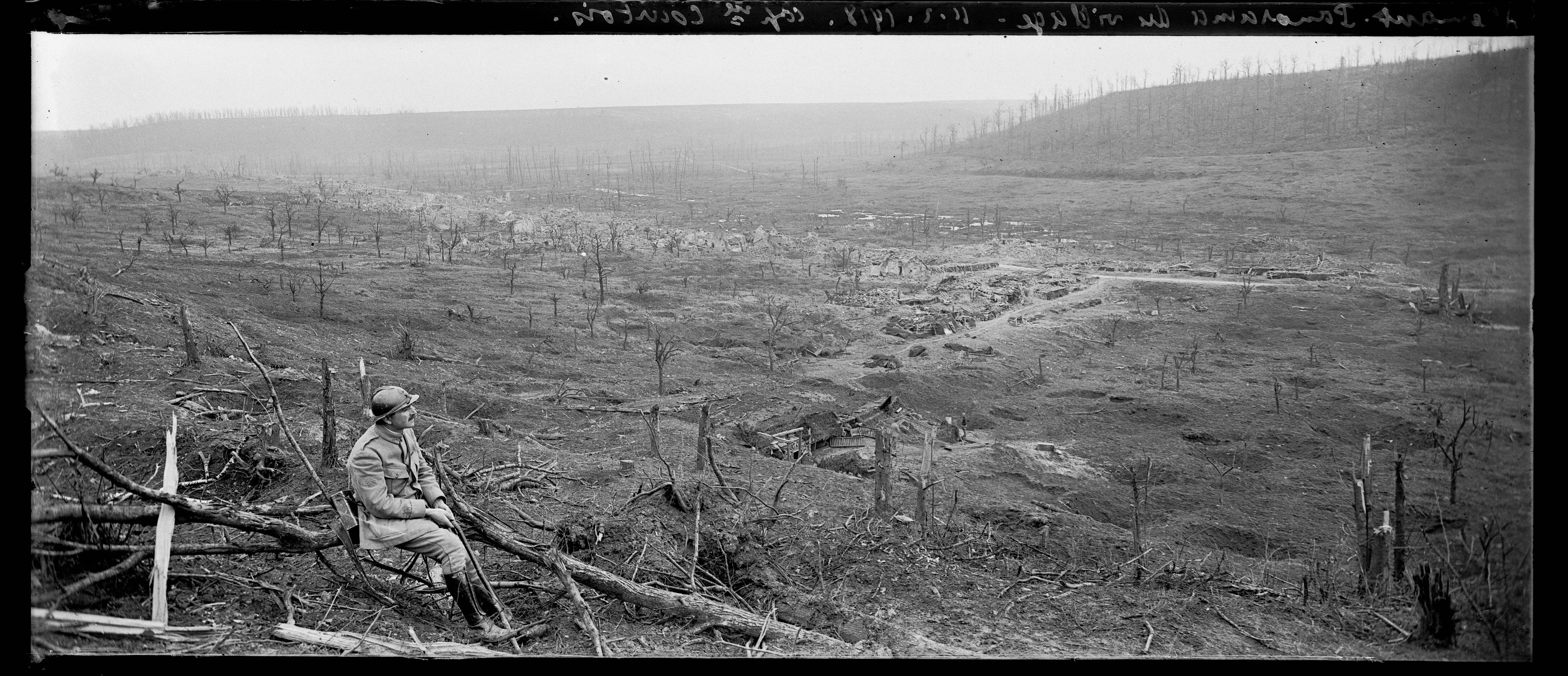 Vue panoramique plongeante du village d'Allemant (Aisne) rasé par les bombardements. Sur la droite de l'image, le capitaine Courtois, observe ce paysage de désolation. 11 février 1918 Guerre 1914-1918.